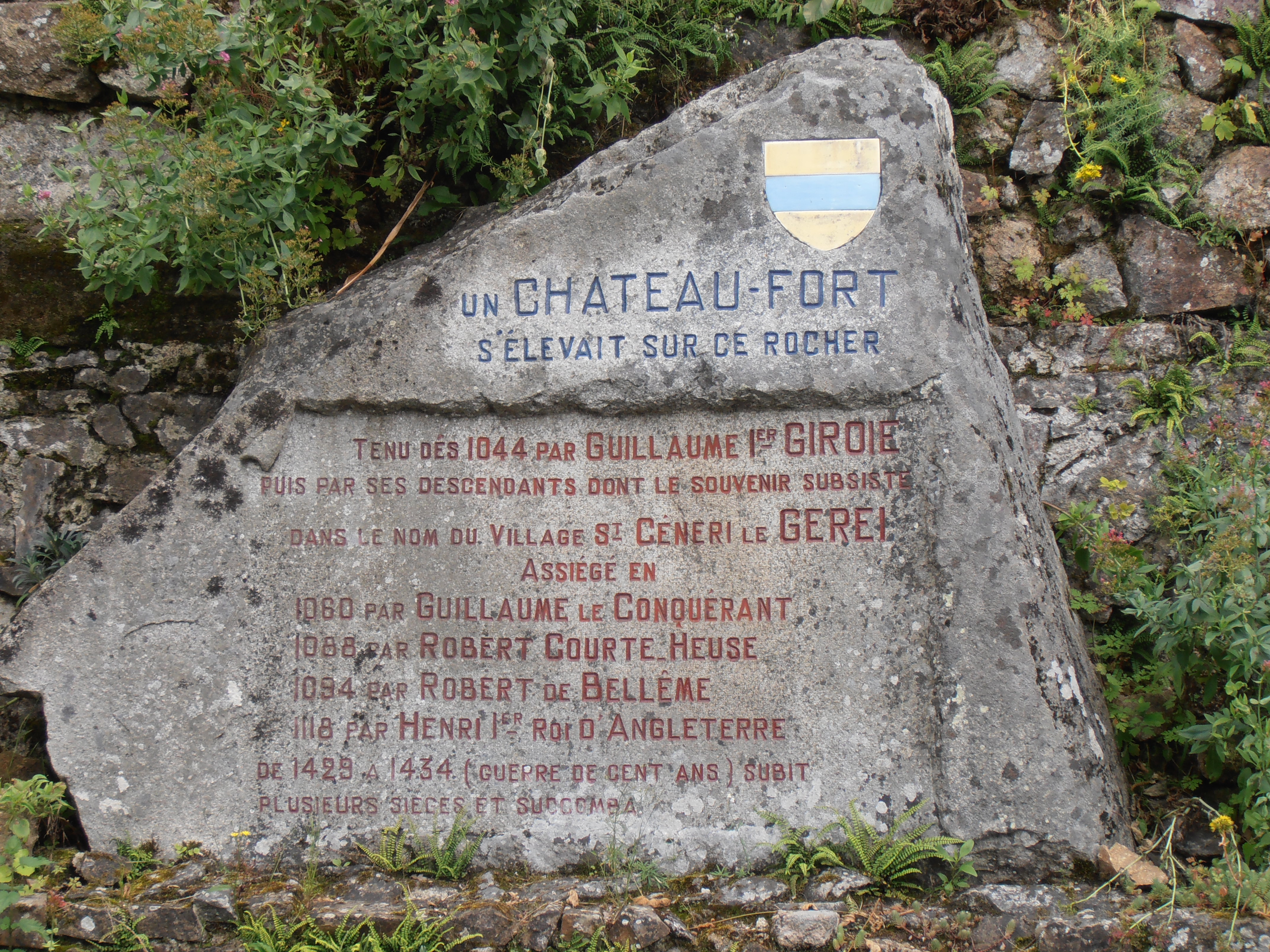 Orne, Saint-Céneri-le-Gérei, Ruines d'un château fort construit en 1049 par Geoffroy de Mayenne : Historique